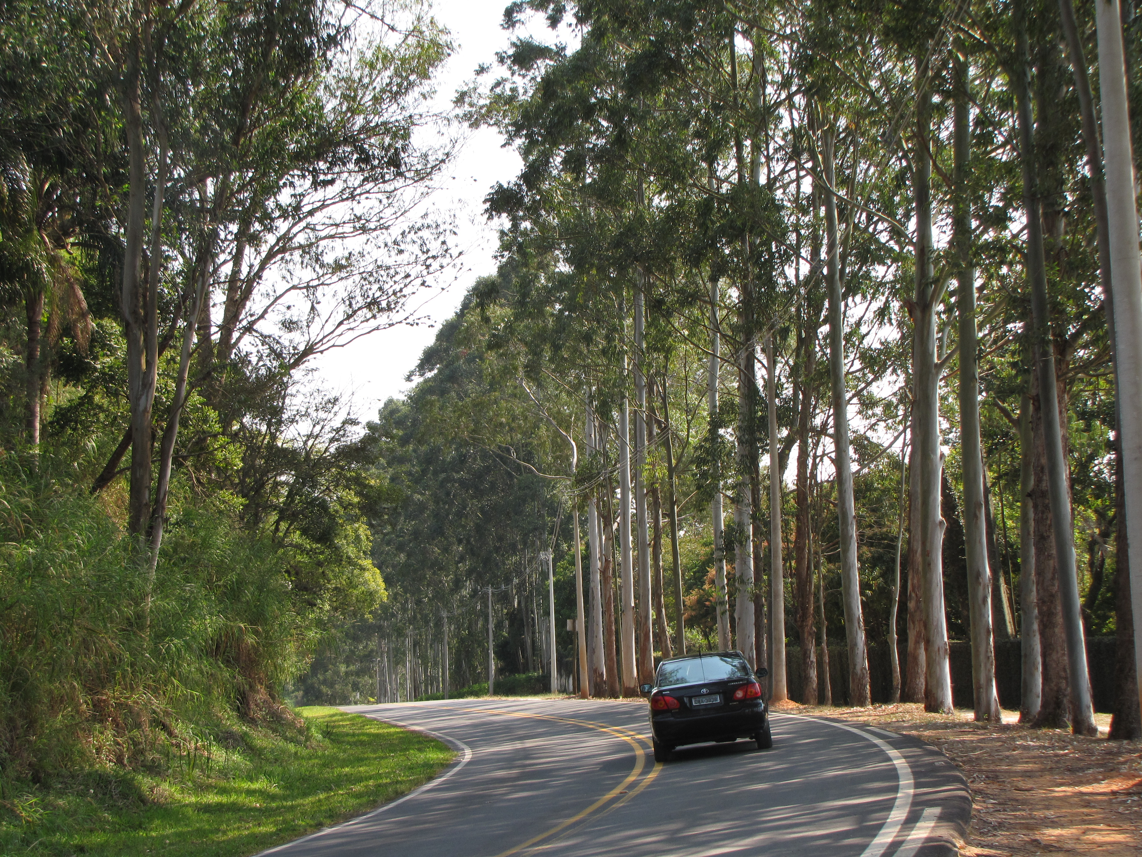 SP081_Joaquim Egídio.